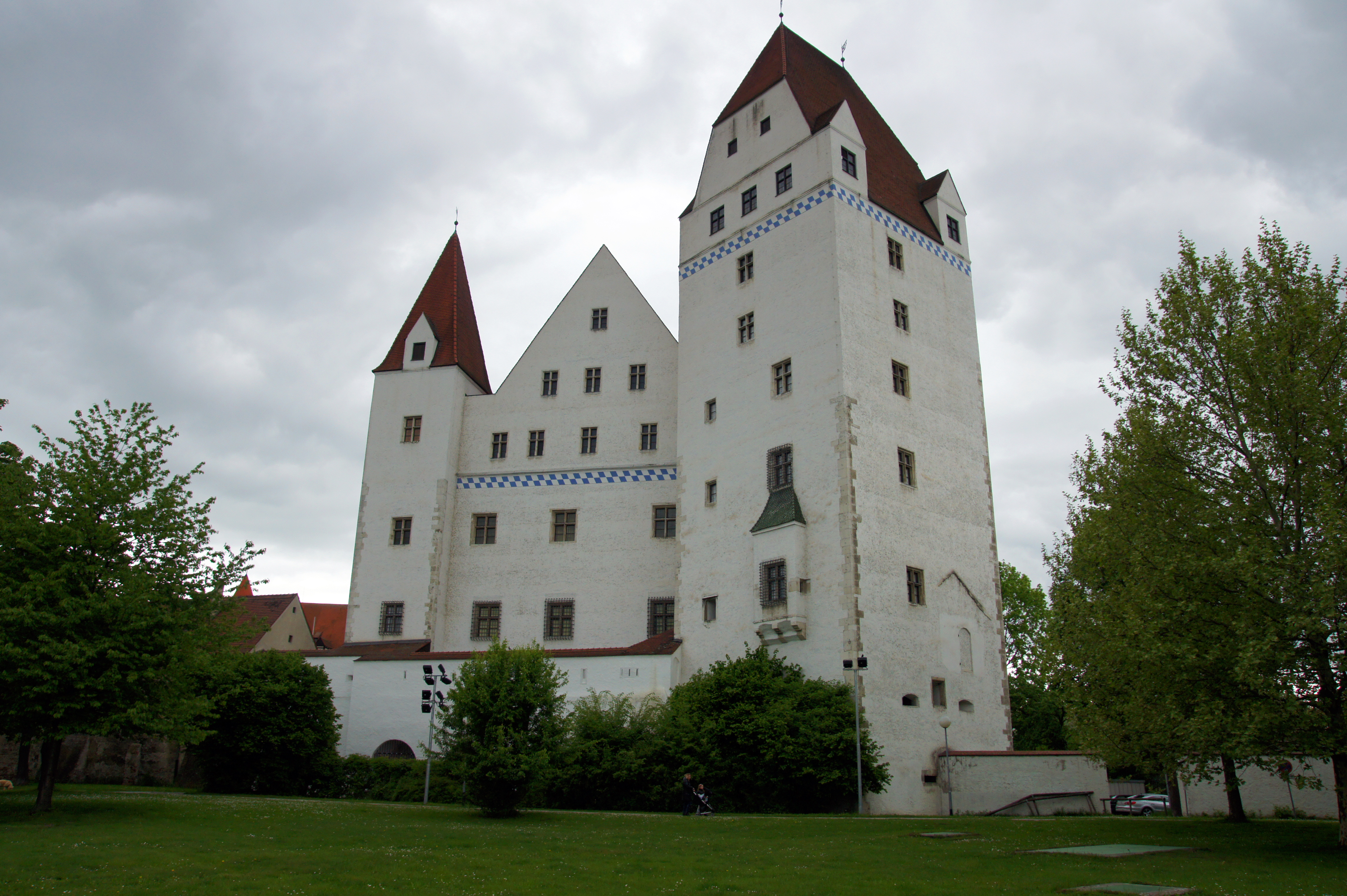 Das Neue Schloss in Ingolstadt von Süden